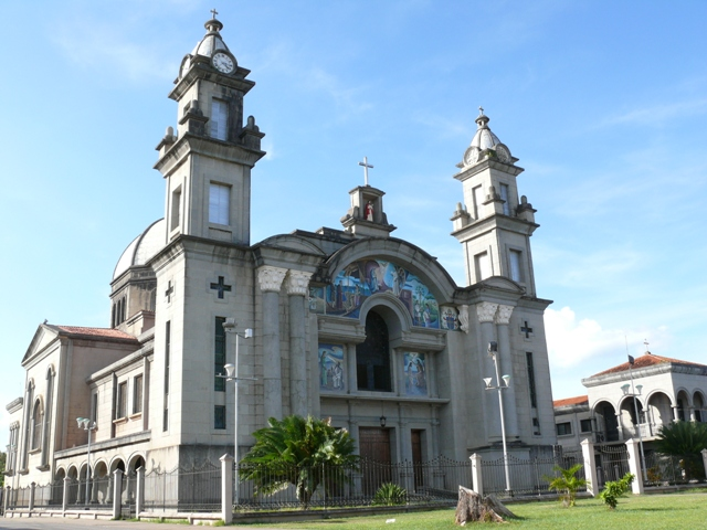 Catedral Divina Pastora, Vicariato apostolico de Tucupita